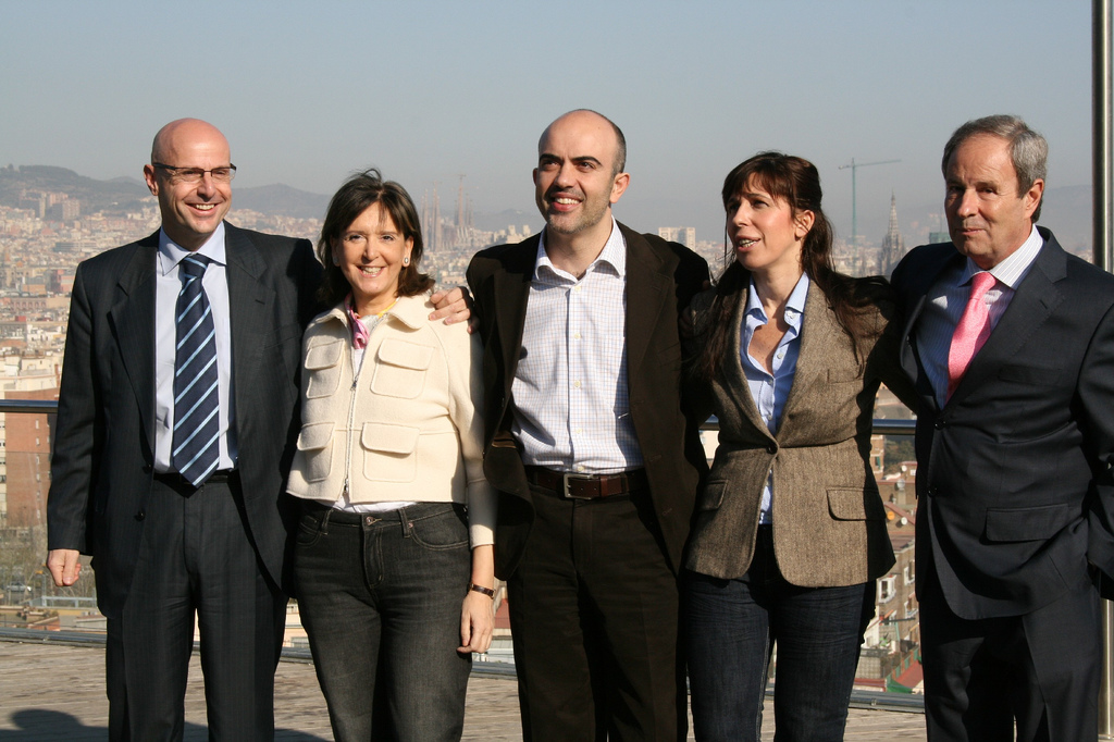 Cabezas de lista del PP en Cataluña para las elecciones generales de 2008. De izquierda a derecha: Francesc Ricomà, Dolors Nadal, Daniel Sirera, Alicia Sánchez Camacho y José Ignacio Llorens.